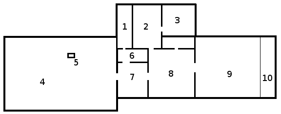 Упрощённая схема второго этажа Патриарших палат в Московском кремле